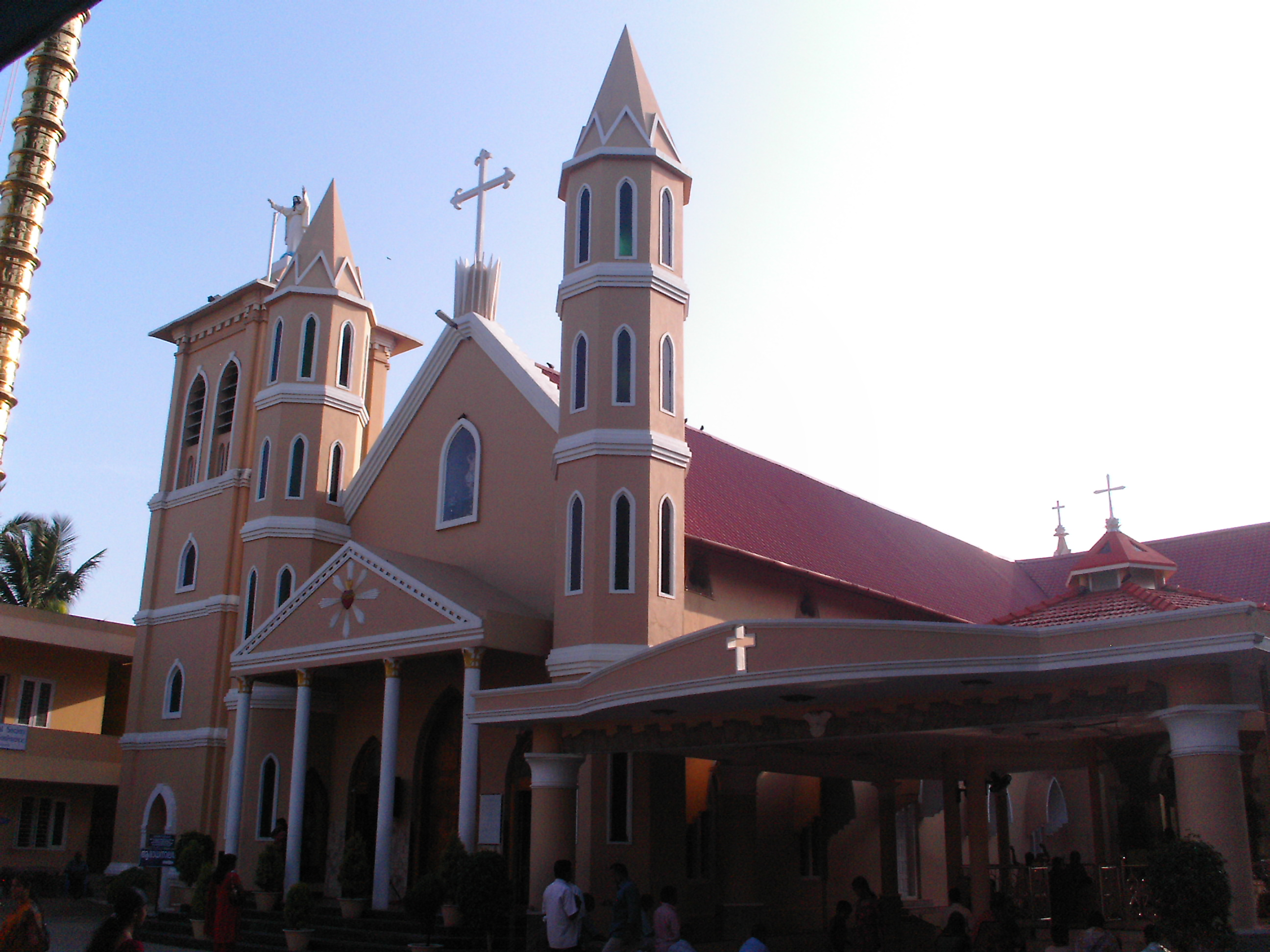 Kollam (Quilon), Kerala, Indien, St. Sebastianskirche in Quilon-Tuet